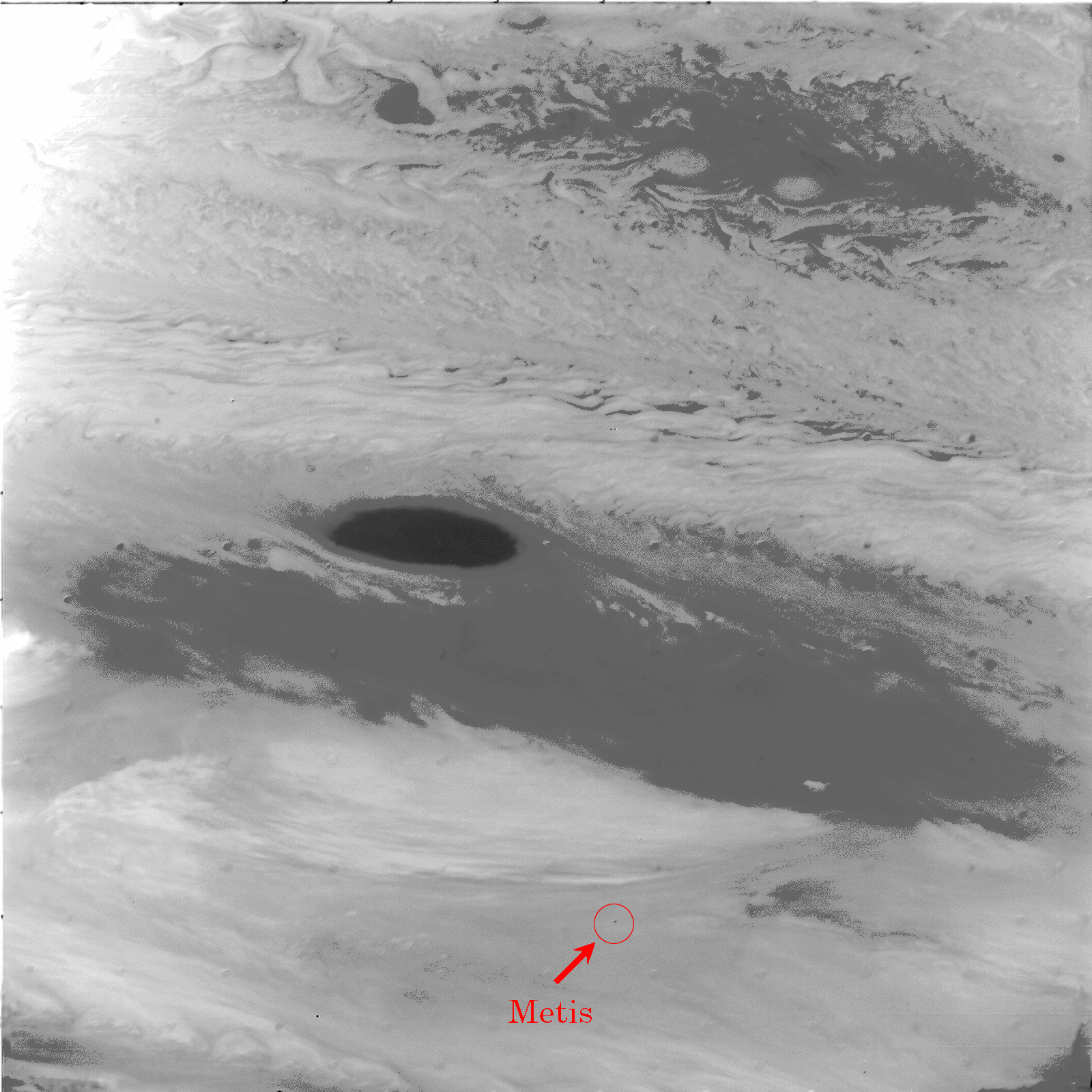 Foto genomen door Voyager 1. Met behulp van deze foto werd de maan Metis ontdekt. Na Adrastea heb ik nu een poging gedaan de foto waarin Metis ontdekt werd tot een toonbaar geheel te bewerken. Ik was inmiddels iets meer ervaren echter bij deze foto was het bij deze foto aanzienlijk lastiger het gatenpatroon weg te werken en er zijn nog restjes zichtbaar. De ruwe foto had een slechte kleurenprecisie. Erg donkere tinten kwamen niet voor, dus om Metis beter zichtbaar te maken heb ik het kleurenbereik opnieuw afgebeeld; het onderste deel van de kleurruime is verwijder en de rest van de kleuren is op de totale kleurruimte afgebeeld. Op deze manier steekt Metis beter af tegen de witte achtergrond.